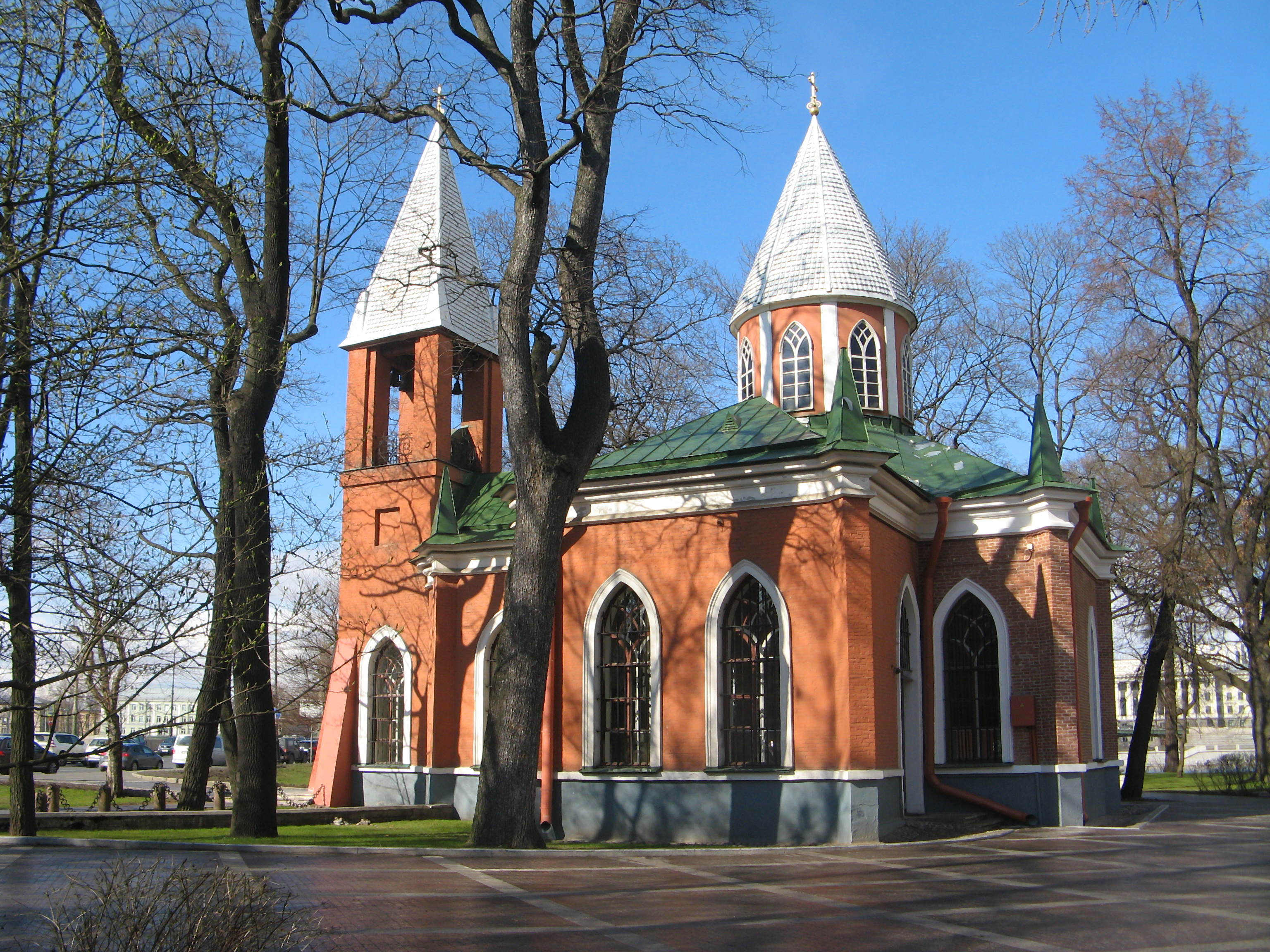 Церковь Рождества Иоанна Предтечи: Каменный остров, Каменноостровский проспект, 83, Петроградский район, Санкт-Петербург